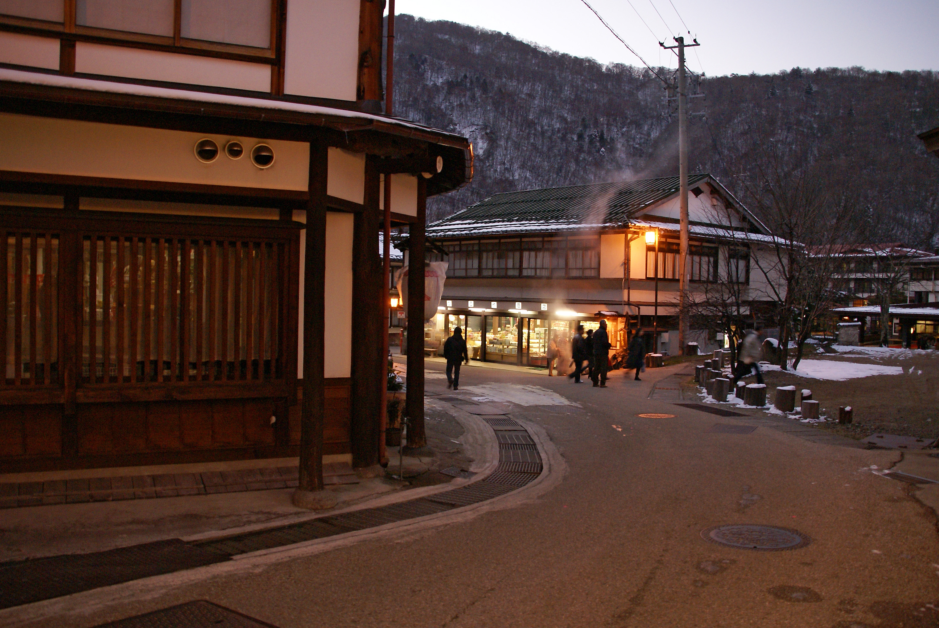 Hirayu Onsen in Takayama, Gifu prefecture, Japan